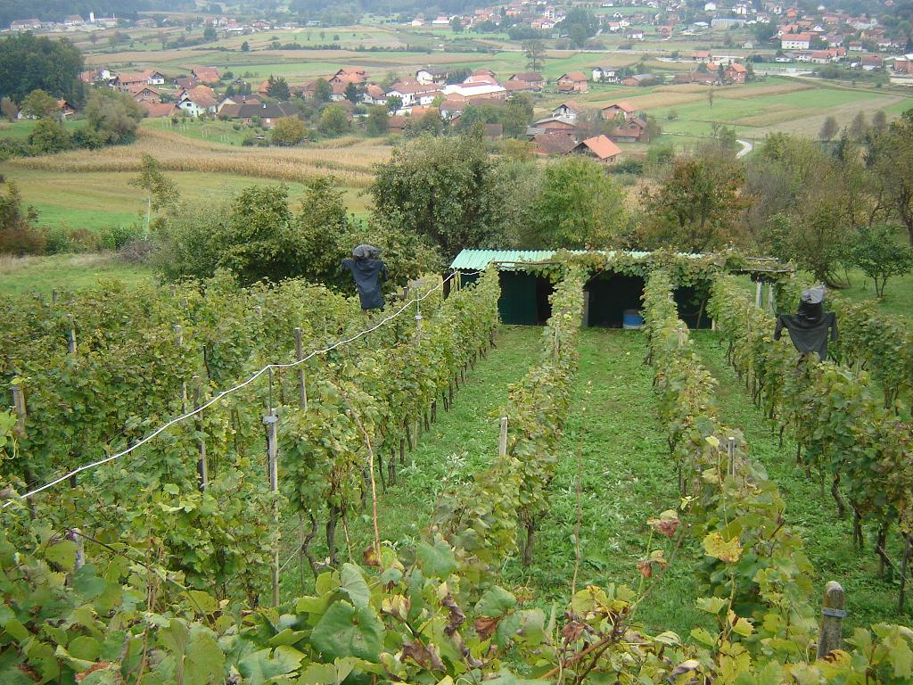 Suza za zagorske brege